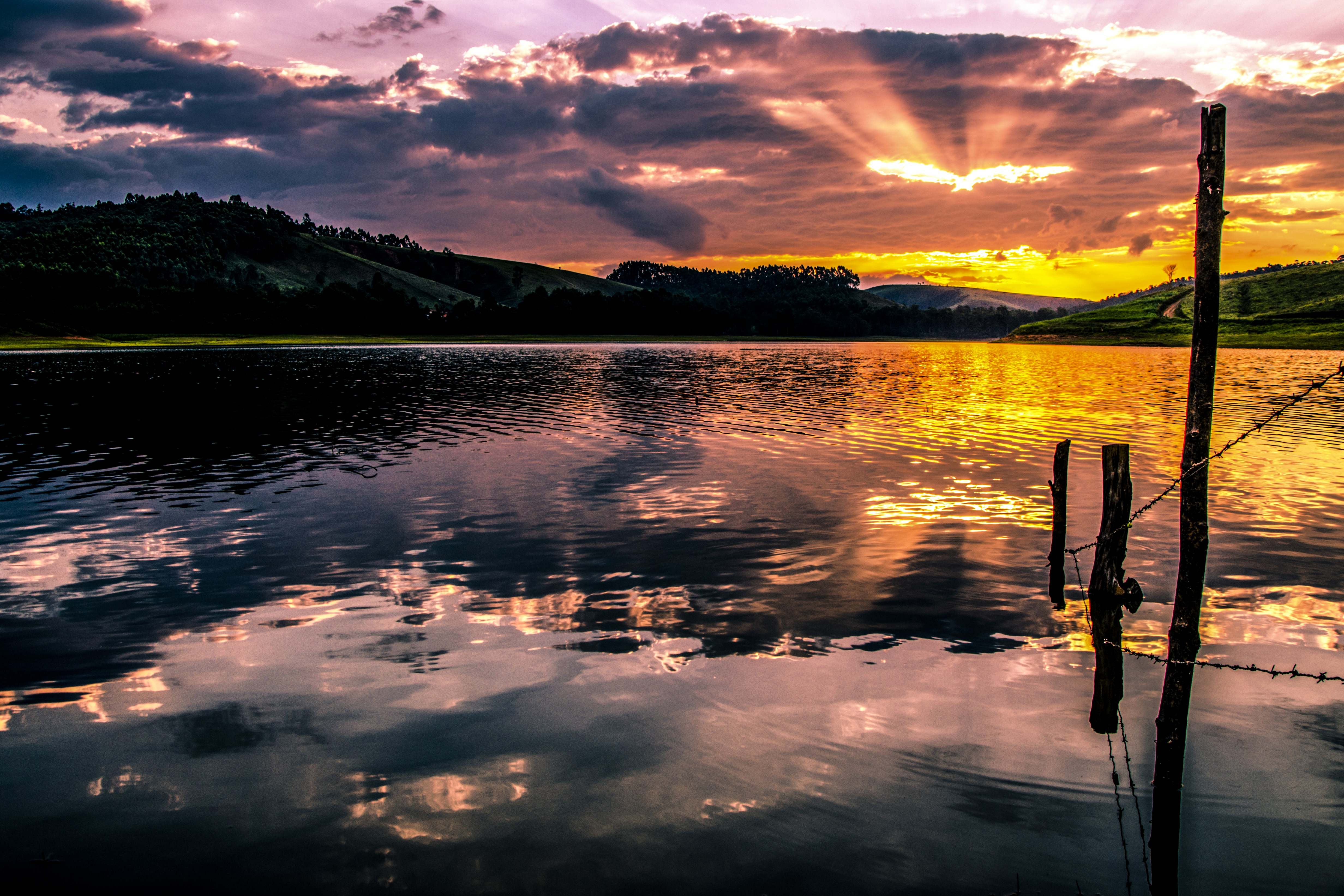 Represa Ponte Preta, localizada em Santos Dumont-MG